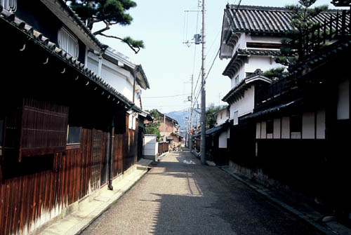 富田林市。